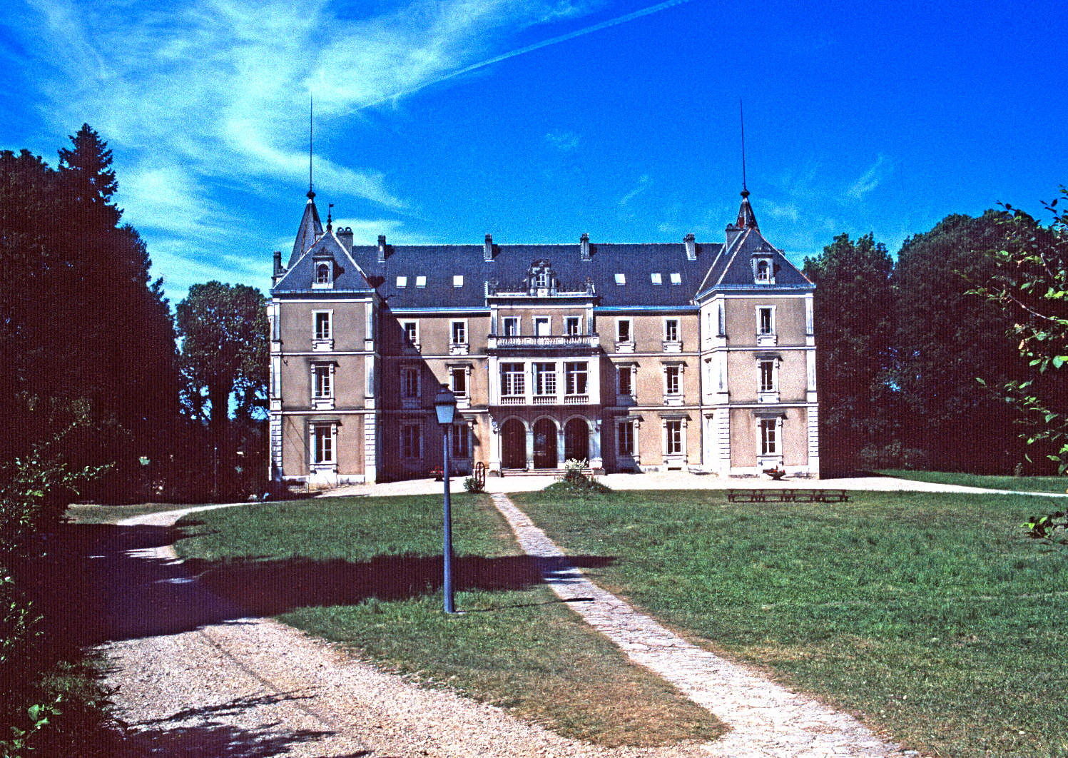 Château de Clervans à Chamblay (39380) en 1977 lorsque ce bâtiment accueillait la colonie de vacances Peugeot.